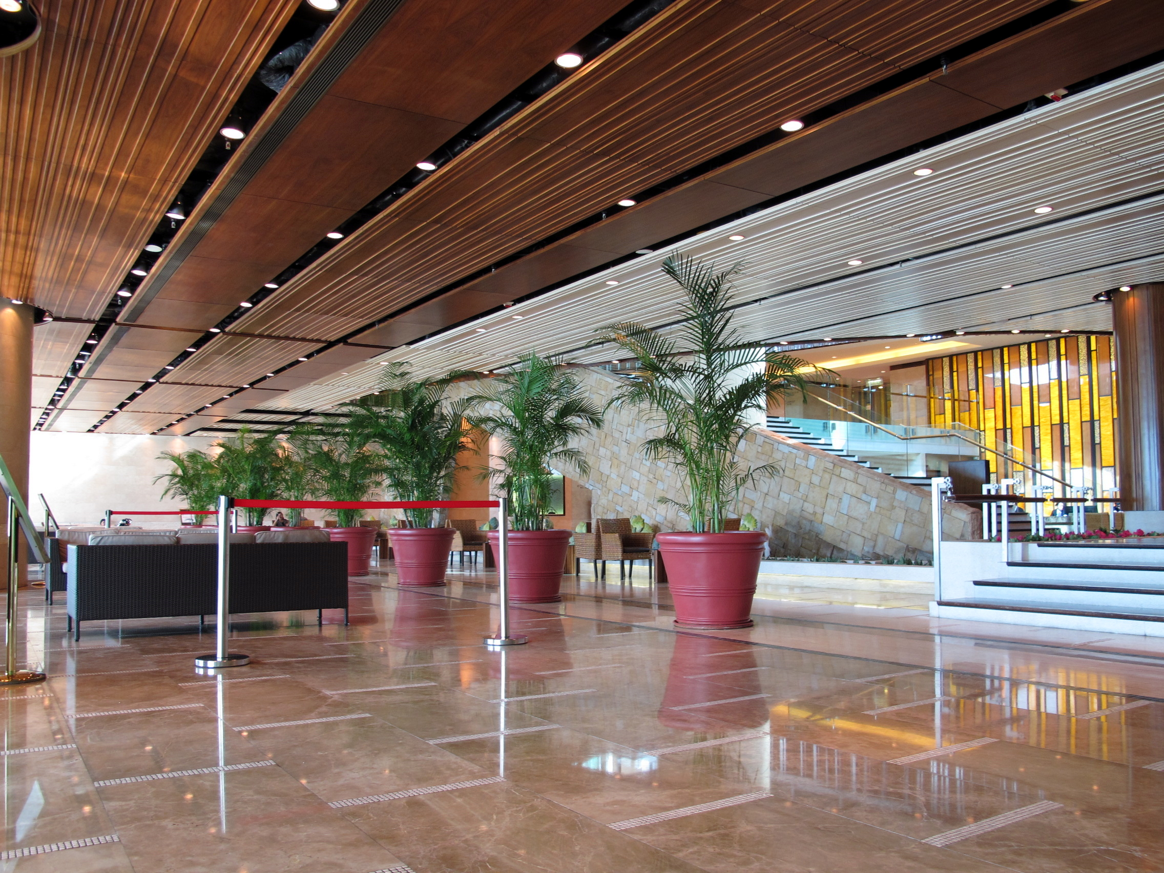 Horizon Suite Hotel Lobby